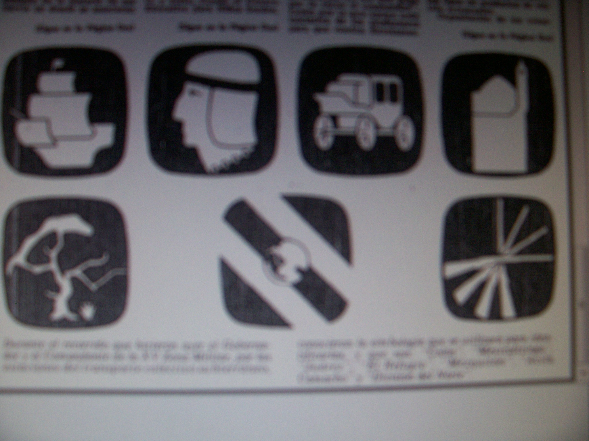 Los logos del las antiguas rutas del Eje norte Sur de las red de lineas de Trolebus de Guadalajara en 1976-1988